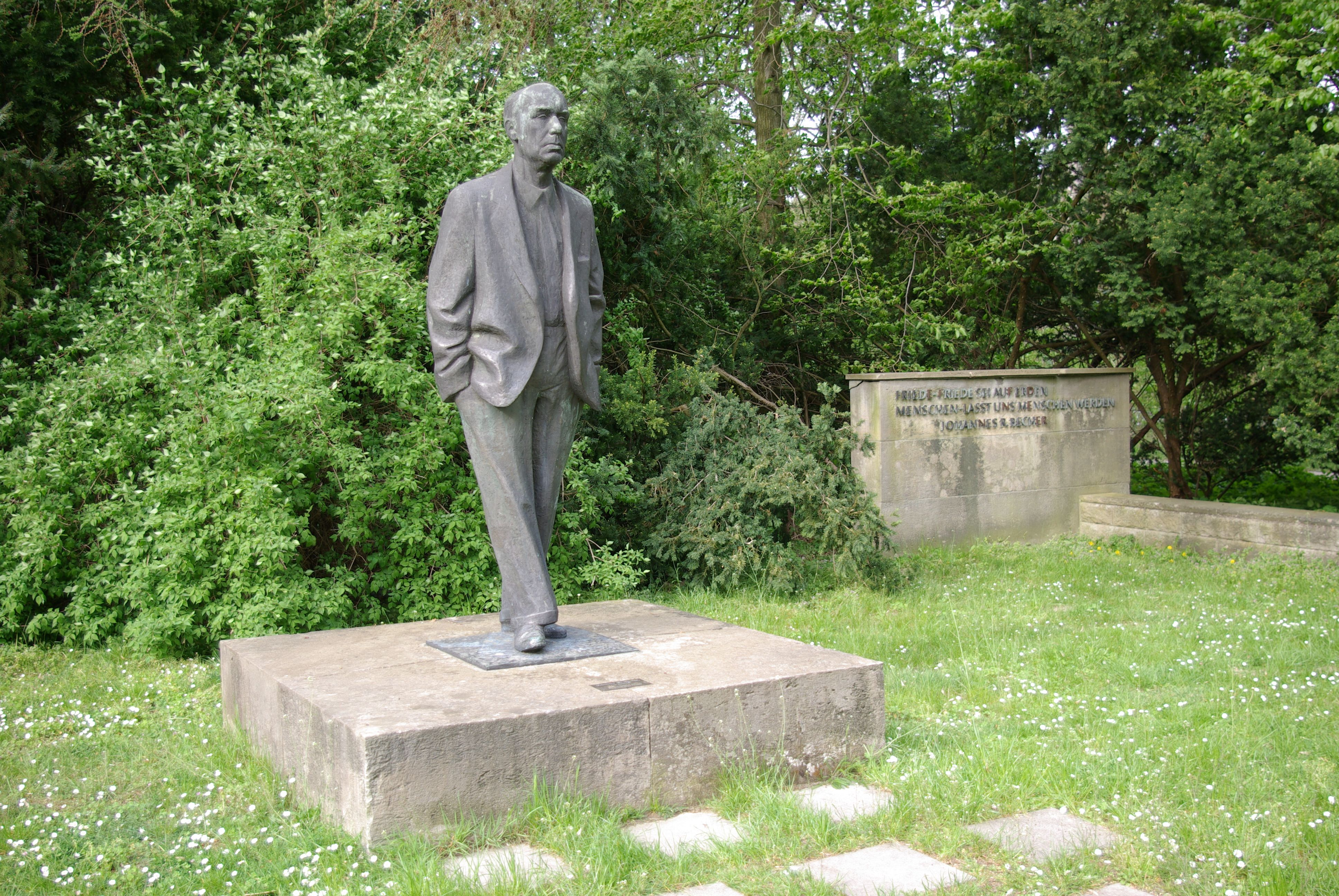 Das Denkmal für Johannes R. Becher von Fritz Cremer am Ende der Seestraße in Bad Saarow. Es stammt aus dem Jahre 1964, aufgestellt 1965, und ist denkmalgeschützt. (Ein Zweitguss wurde 1976 in Berlin-Pankow aufgestellt)